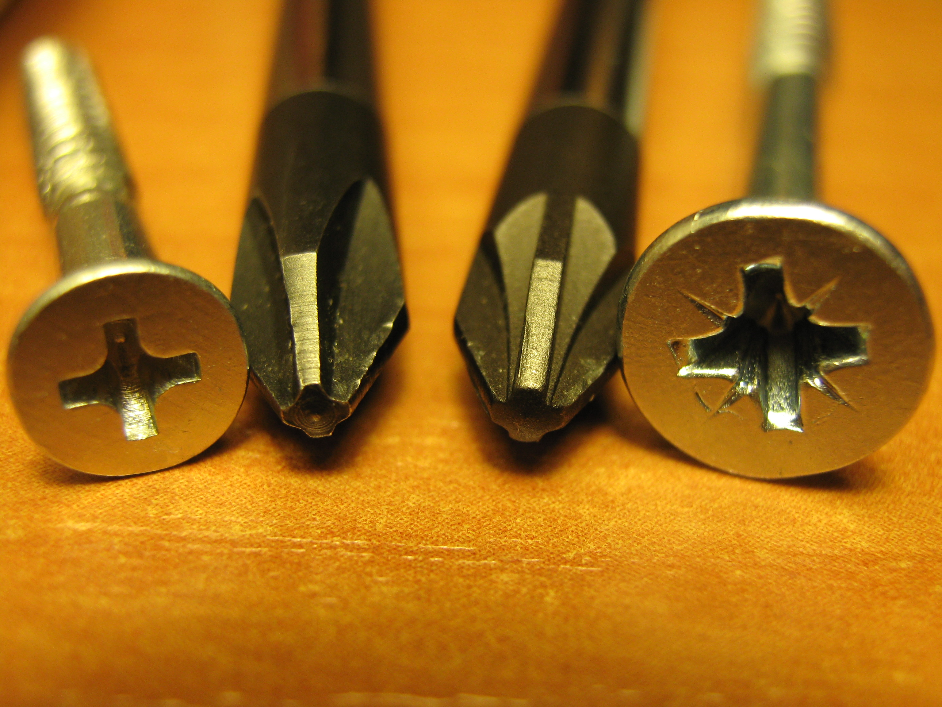 Шлицы отвёрток Филлипс и Позидрив с соответствующим крепежом